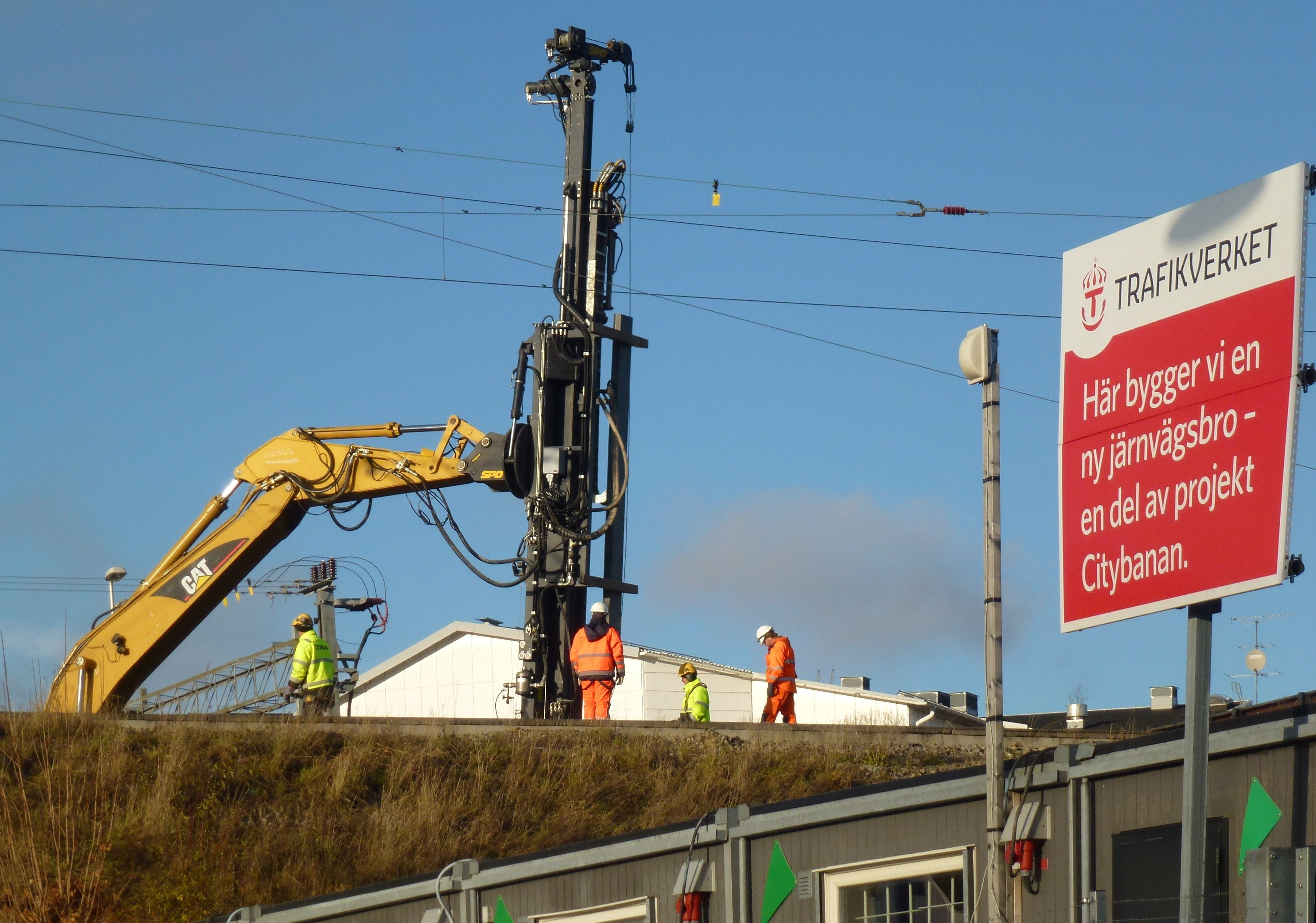 Bron Årsta-Älvsjö är en enkelspårig som uppförs i samband med Citybanan